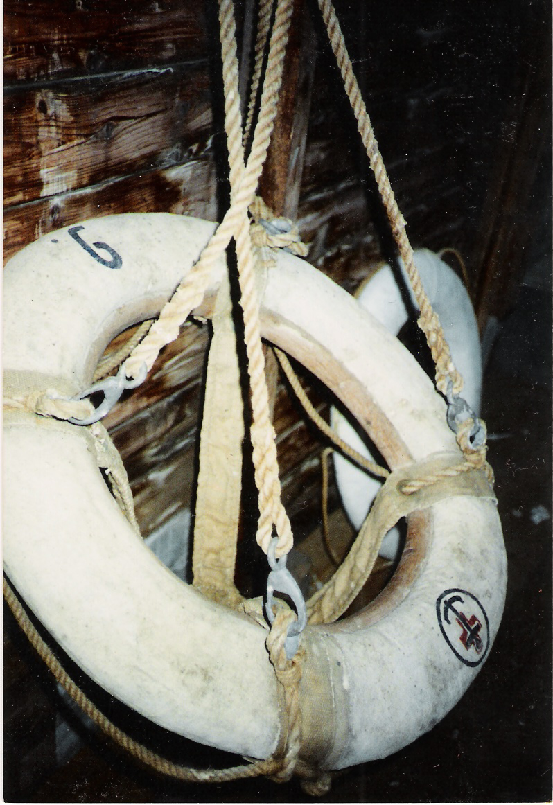 Meripelastustyössä käytettävä siirtoistuin, ns. housupoiju. Poiju kuuluu Suomen Meripelastusseuran Degerbyn entisen pelastusaseman, nykyisin museoidun venevajan varusteisiin. Poijun rengasosa ja lukot alkuperäisiä, köydet ja liinat uusittu museoinnin yhteydessä.